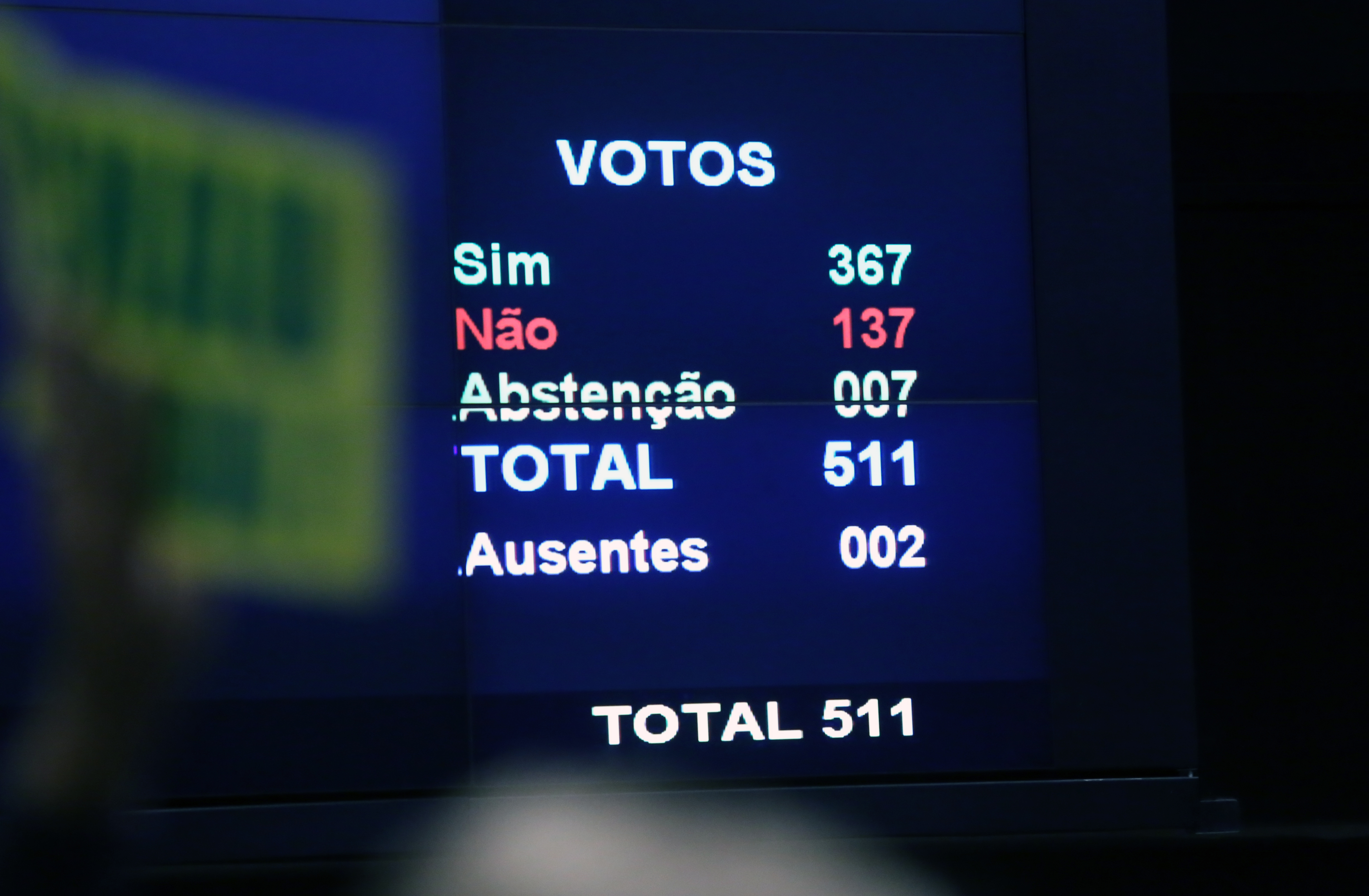 Placar final da votação do impeachment da presidente Dilma Roussef